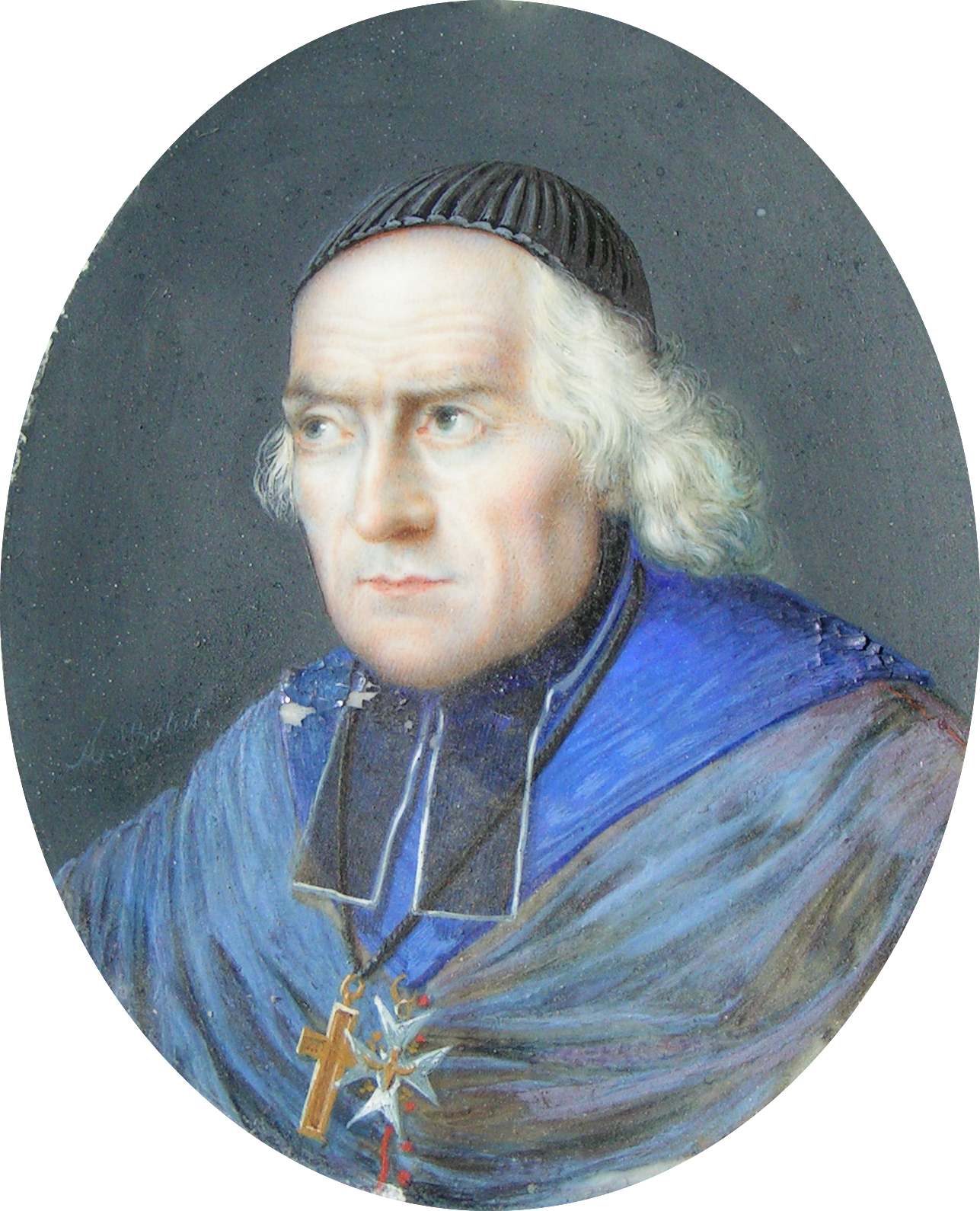 Portrait Mgr d'Aviau du Bois de Sanzay par Batut, collection château de Ternay